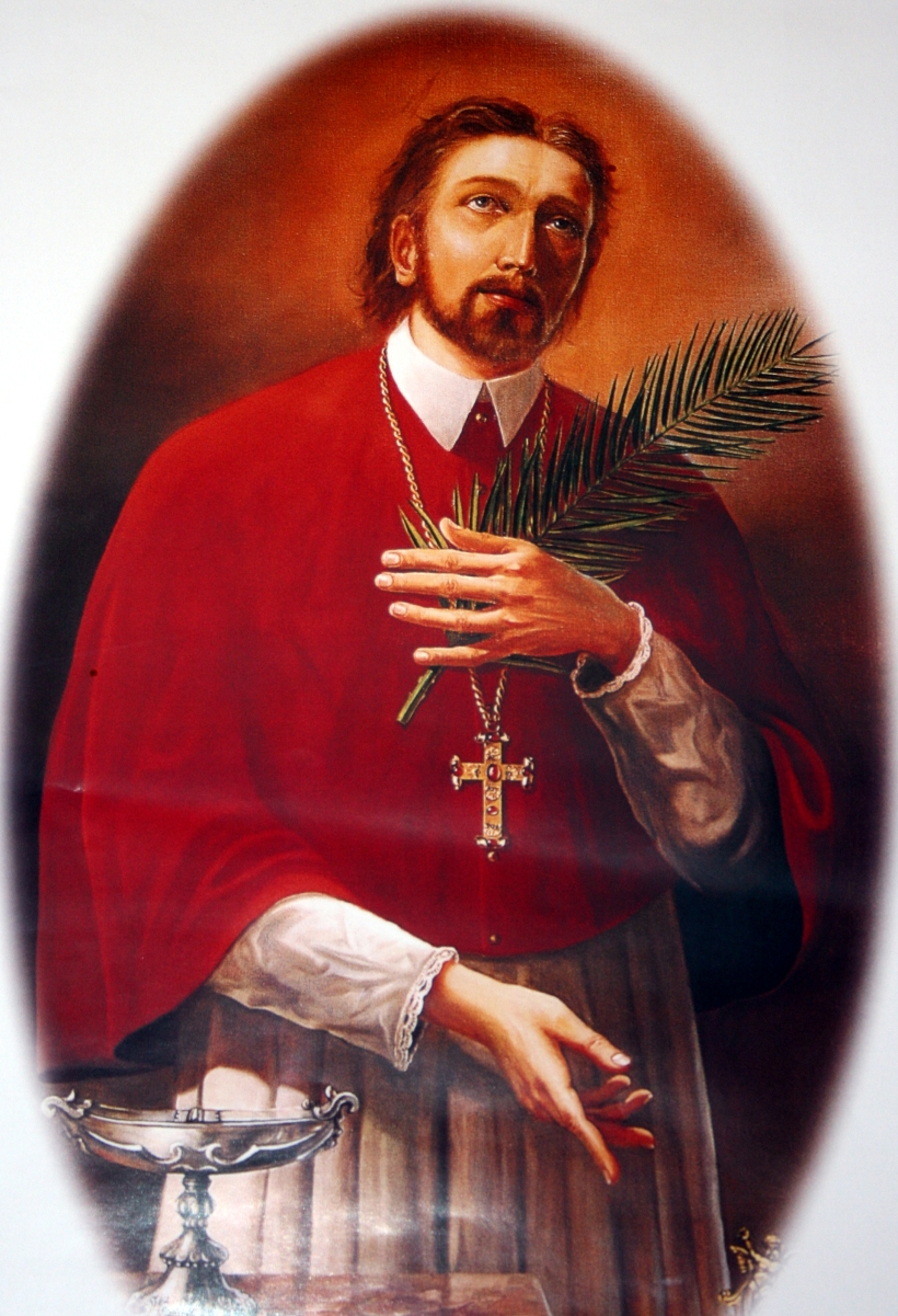 Sveti Marko Križevčanin, Križevci, Hrvatska